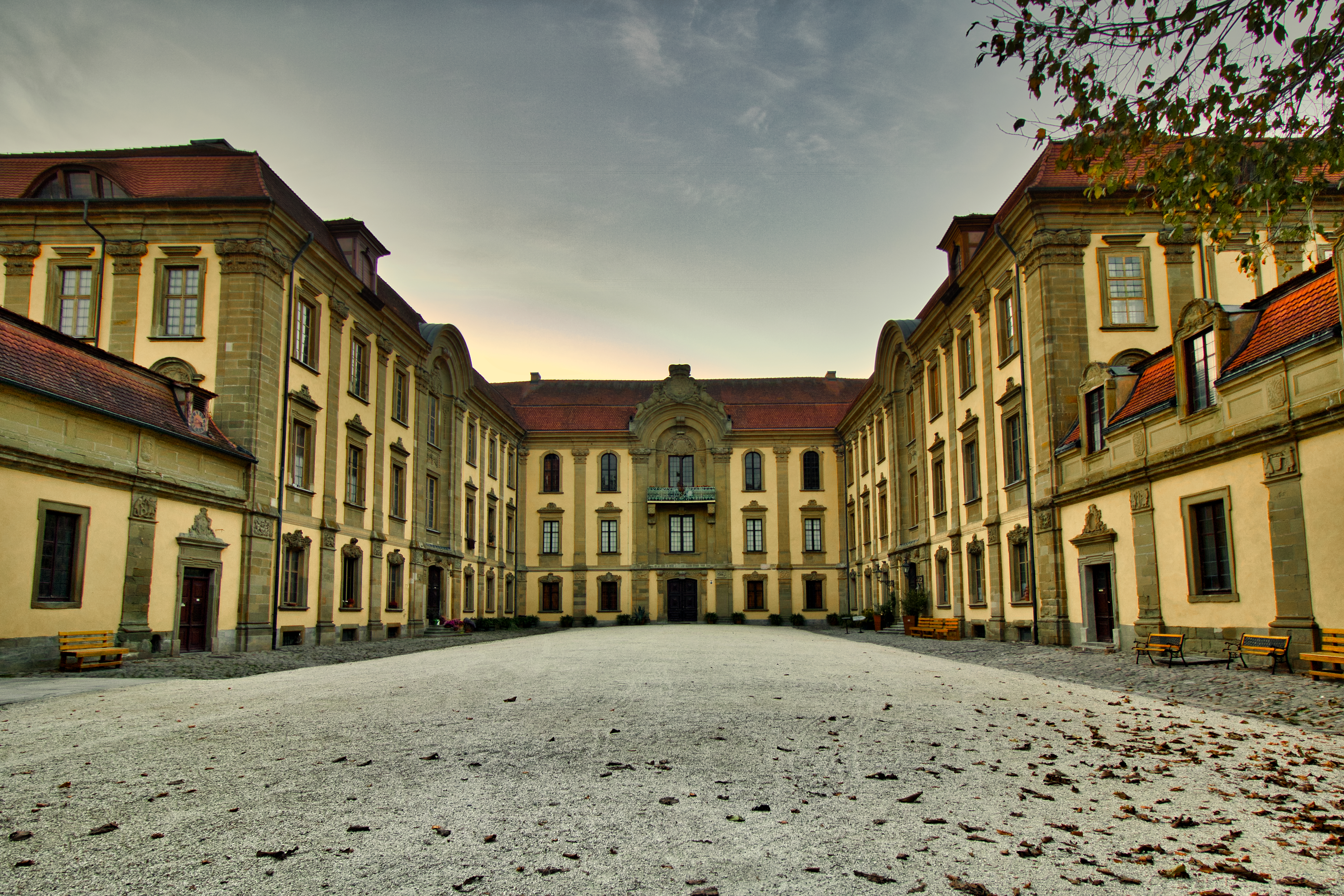 Schlosshof vom Schloss Schillingsfürst im Herbst